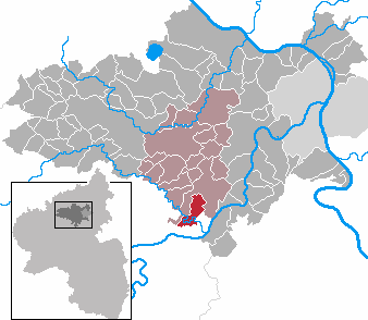 Wierschem in Rhineland-Palatinate - district Mayen-Koblenz